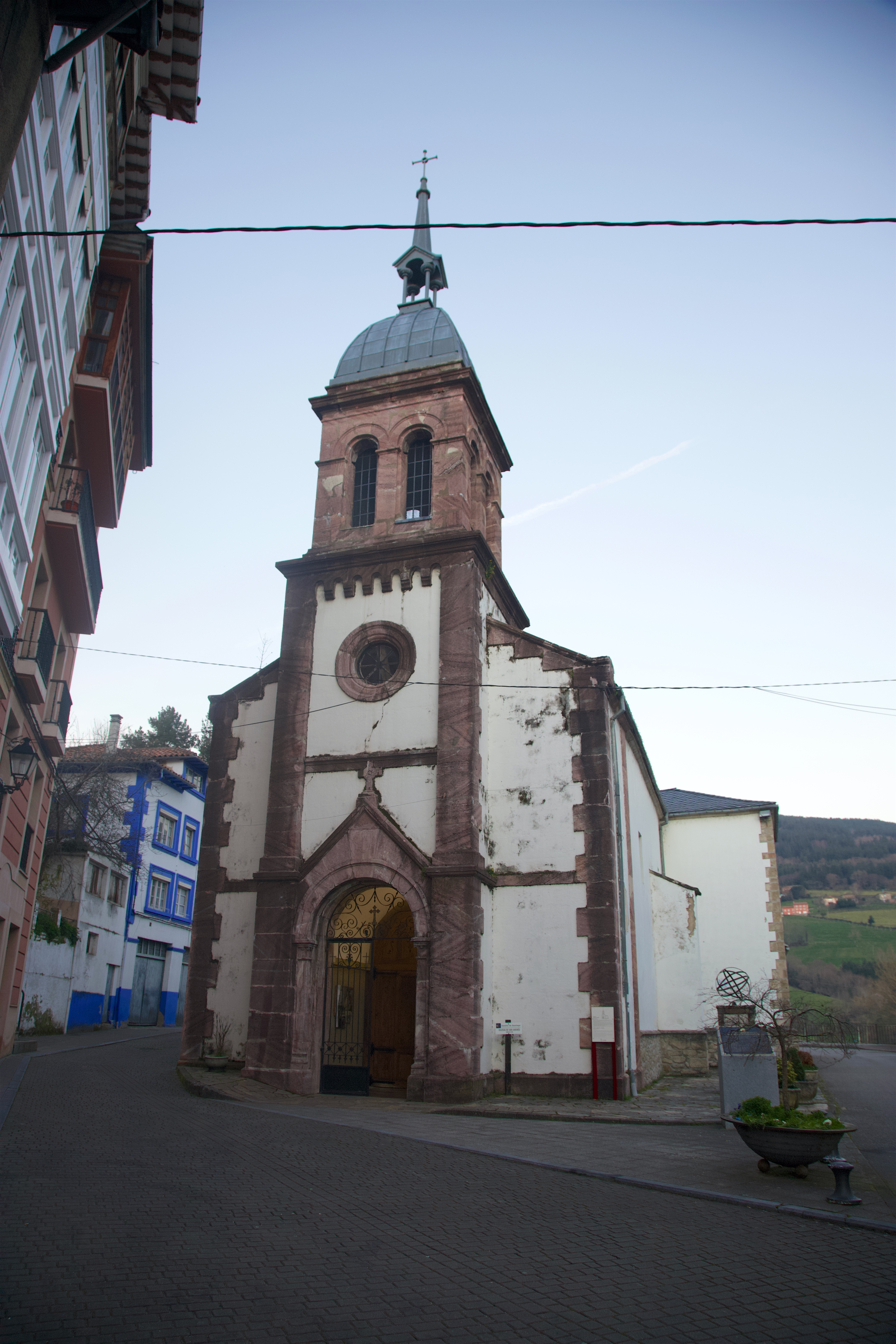 Iglesia de San Andrés (Pola de Allande)